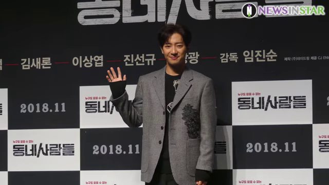 Lee Sang-yeob en la rueda de prensa de The Villagers